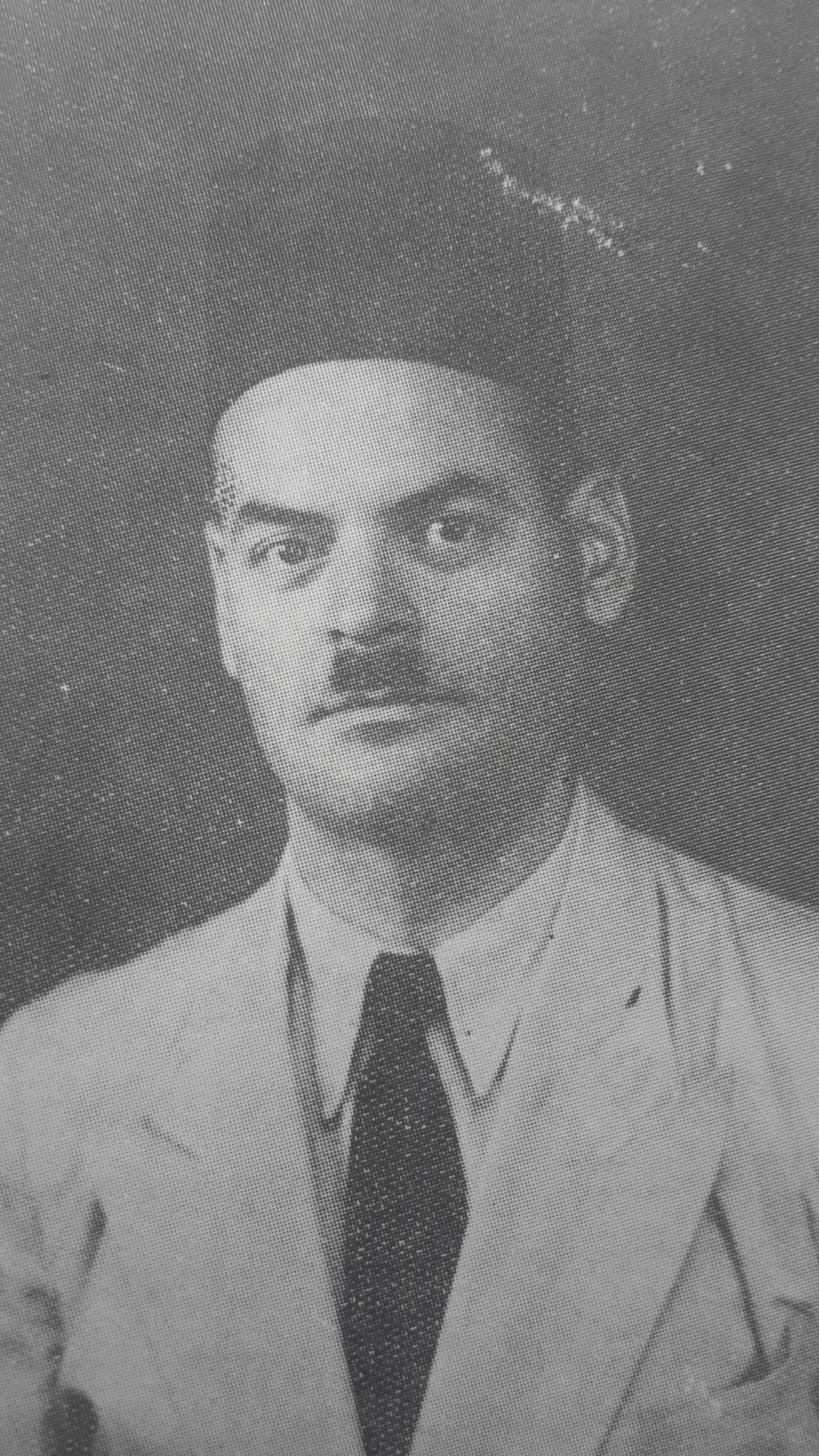 סעד מלכי